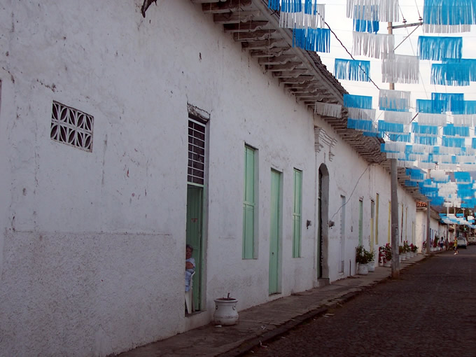 Calle típica de Parácuaro — casas altas de adobe con tejado rojo y calles empedradas.